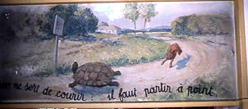 Illustration de la fable de Jean de La Fontaine: le lièvre et la tortue, Livre VI, fable X .